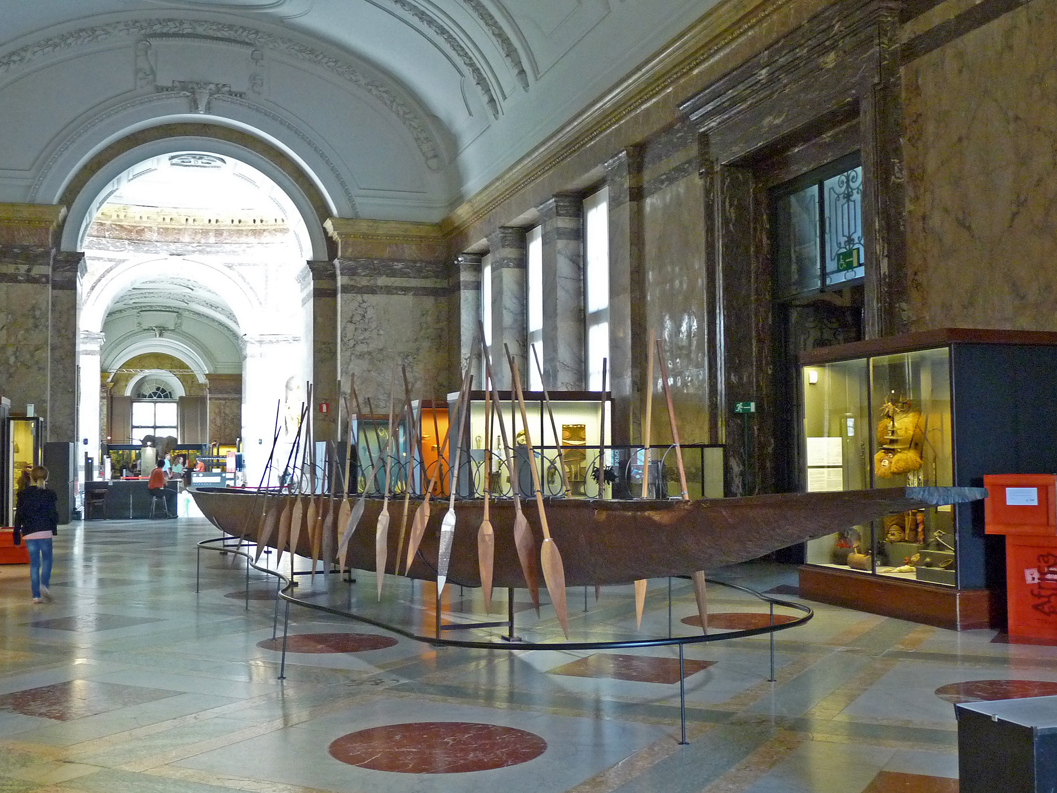 Musée royal de l'Afrique centrale : grande pirogue utilisée par Léopold III au Congo et offerte par les habitants d'Ubundu. Installée au musée en 1958. Bois : Entandrophragma utile. Dimensions : longueur : 22,5 m ; largeur : plus de 1 m par endroits ; poids : près de 3 500 kg.